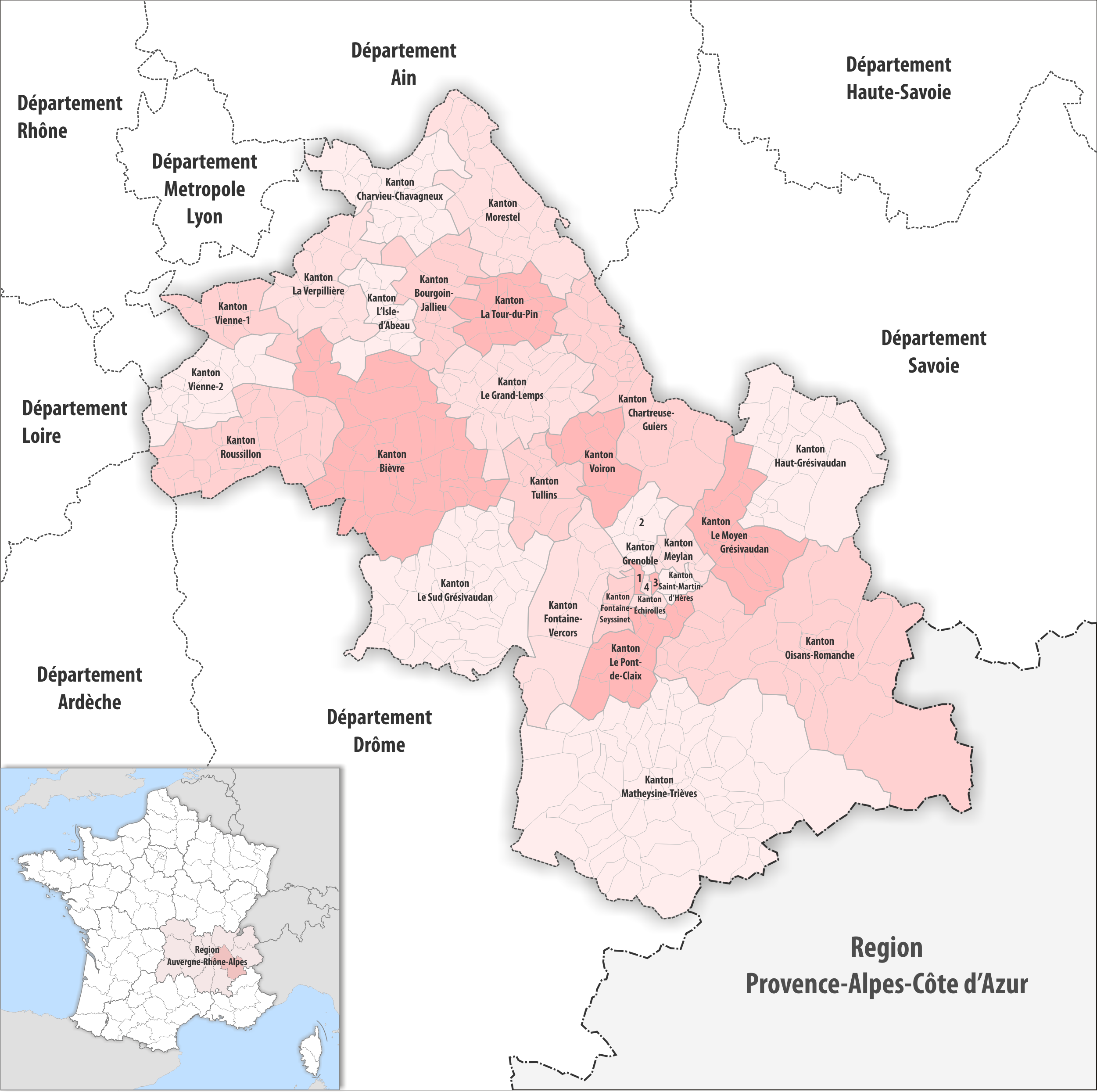 Gemeinden und Kantone im Departement Isère